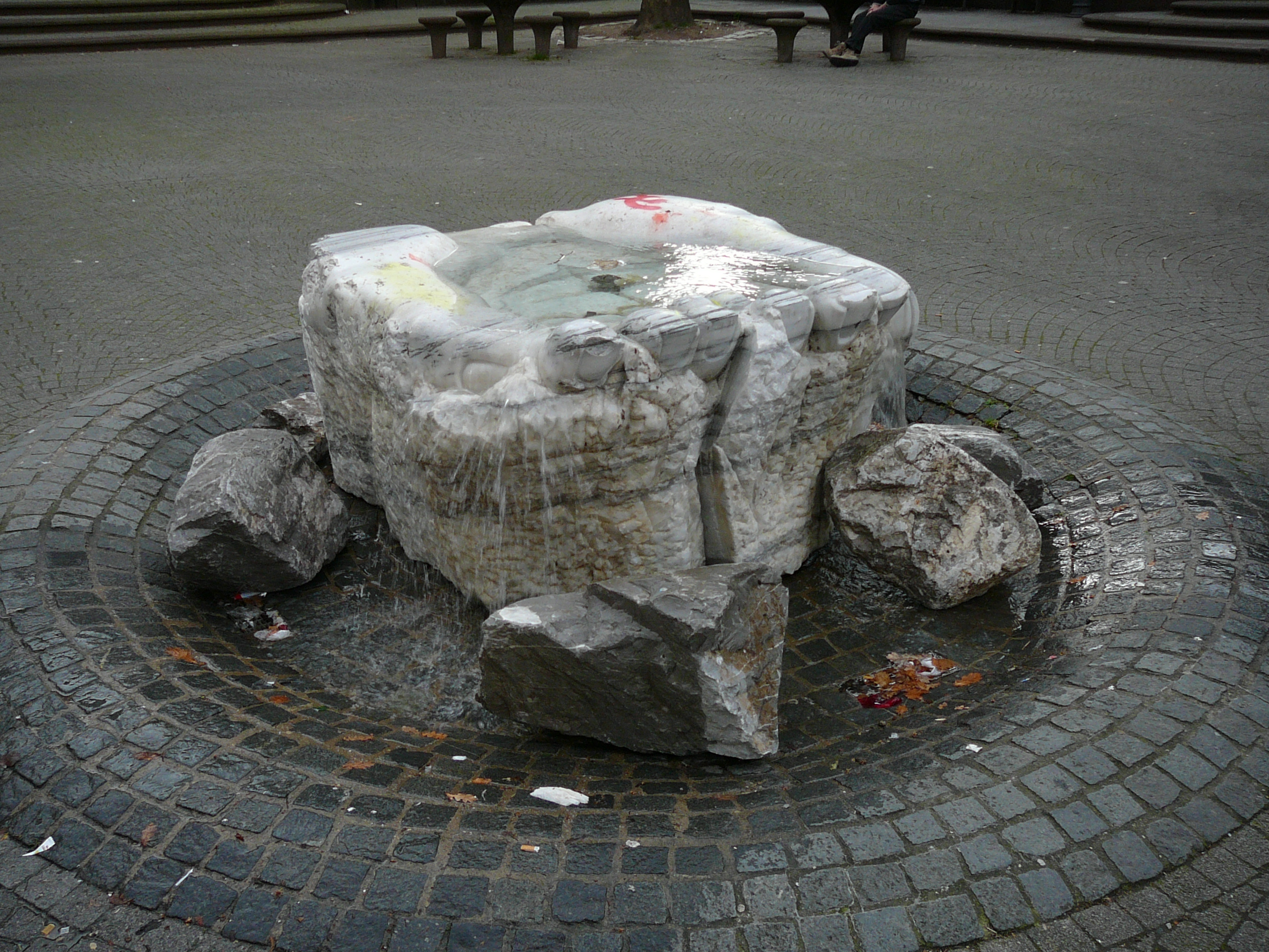 Wichlinghauser Markt, Wuppertal/Oberbarmen